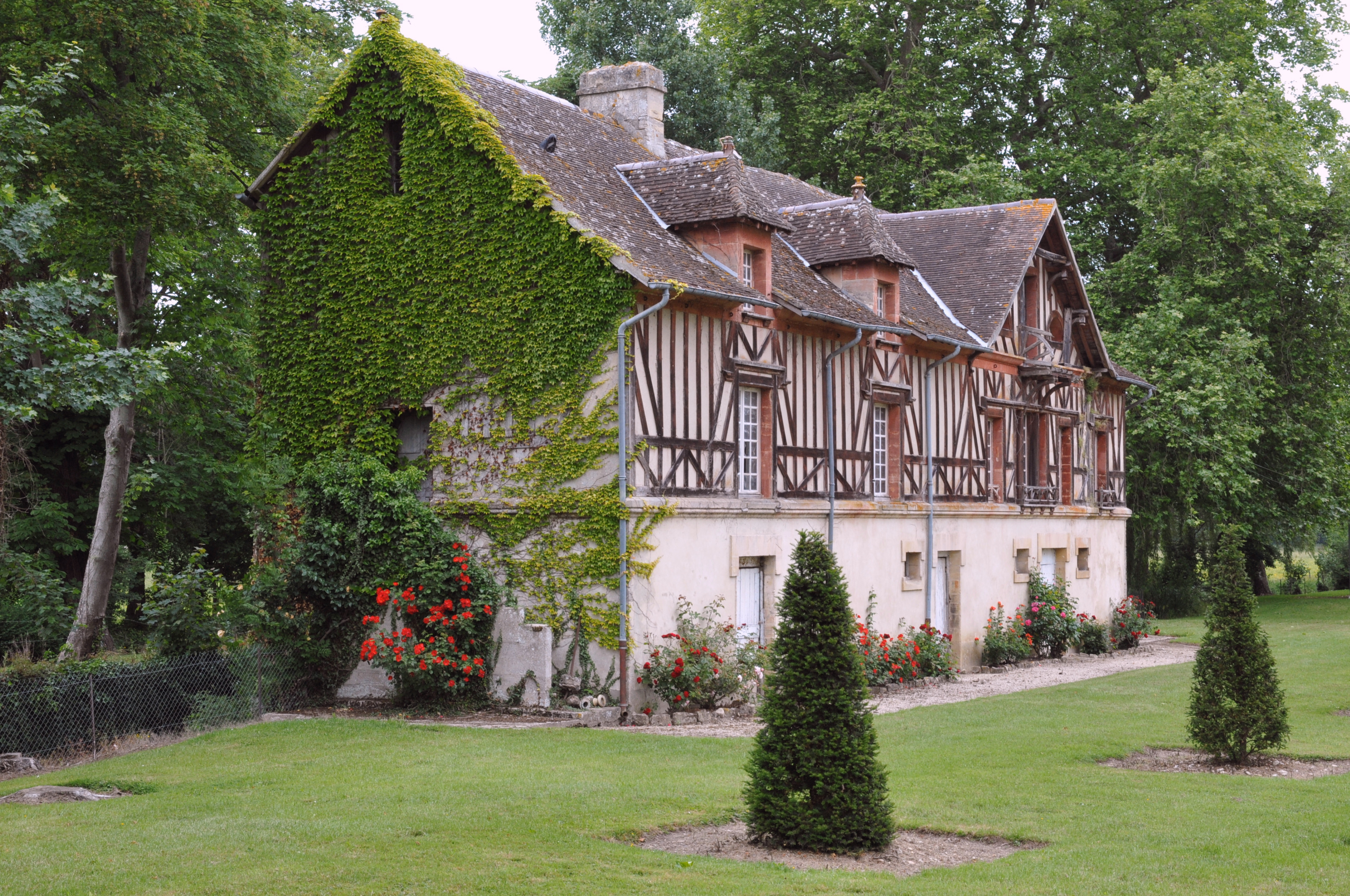 Schloss Vaussieux in Vaux-sur-Seulles, Calvados, Normandie; ehemalige Mühle